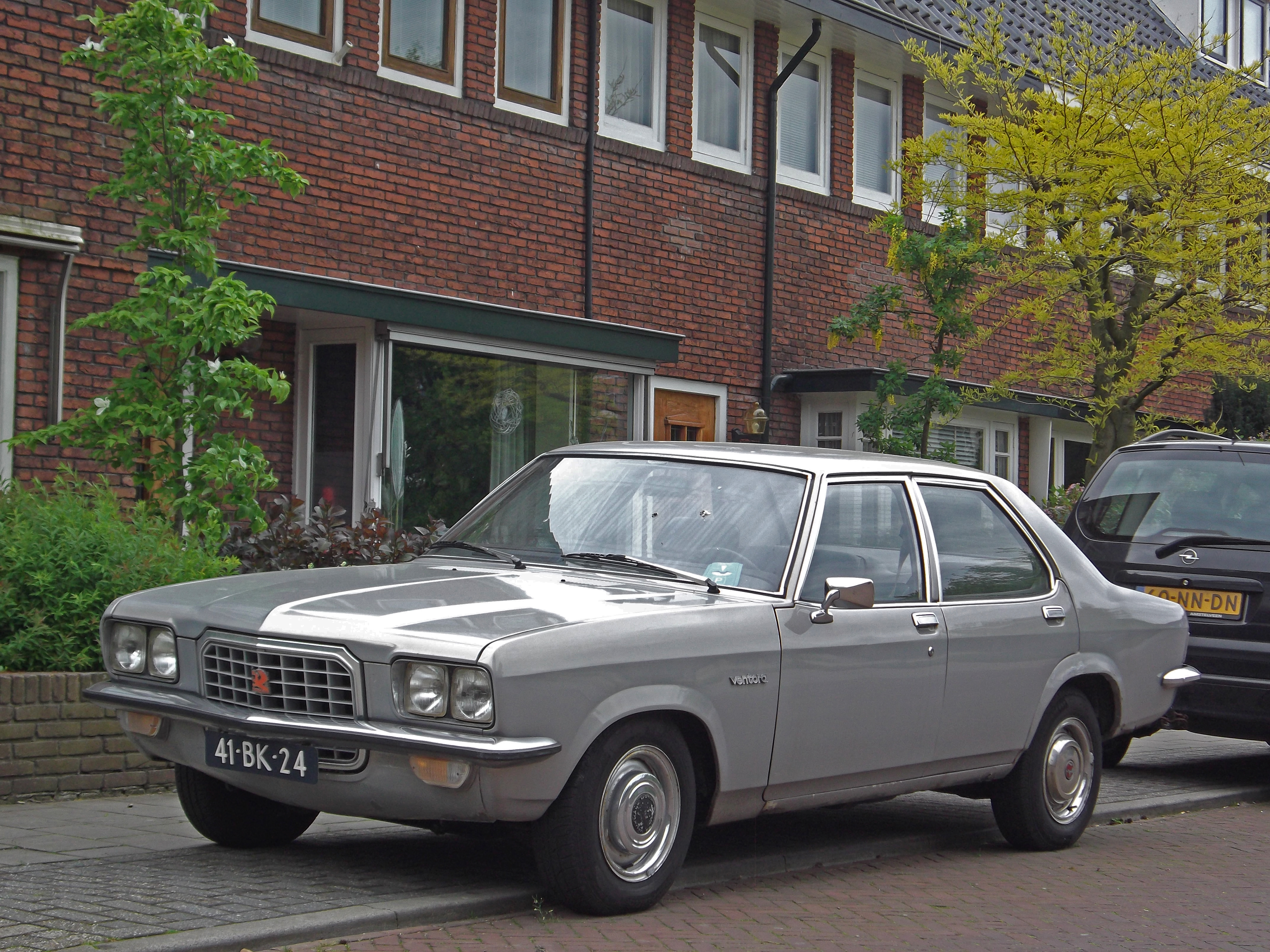 1974 Vauxhall Ventora Saloon (FE Series).